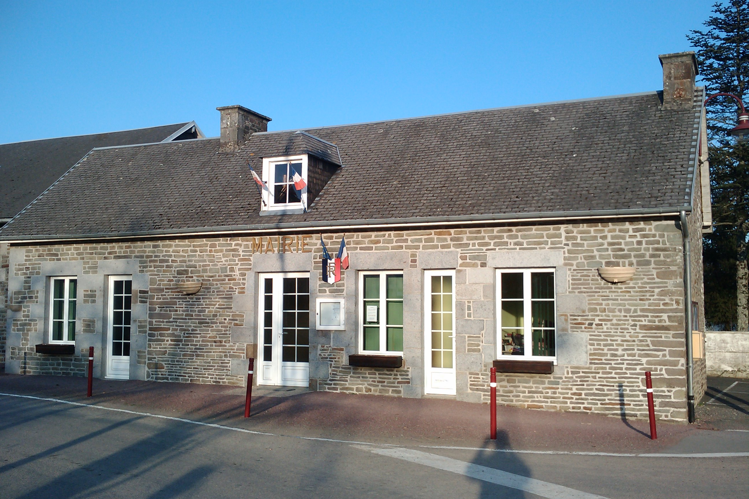 Mairie de Fleury (Manche)